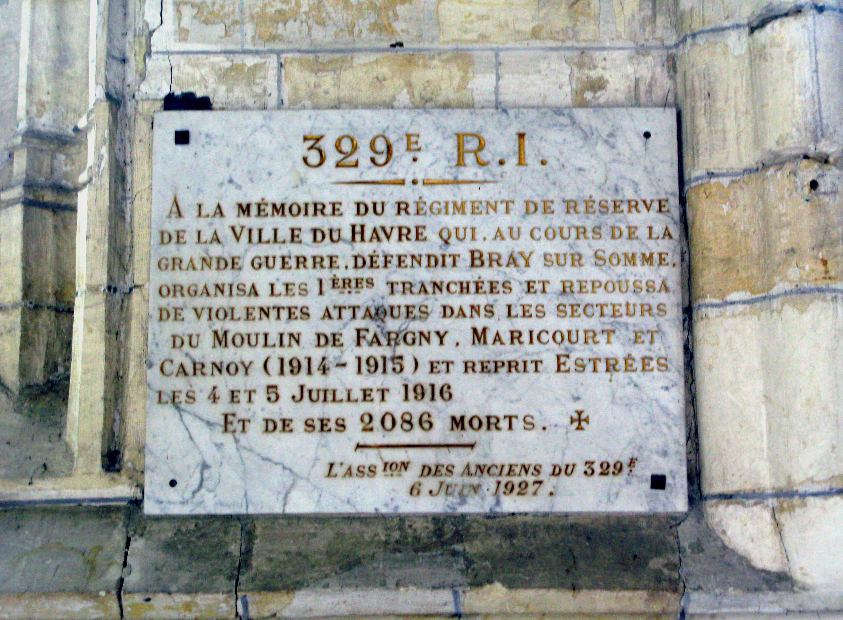 Bray-sur-Somme (Somme, France) - Plaque à l'intérieur de l'église.